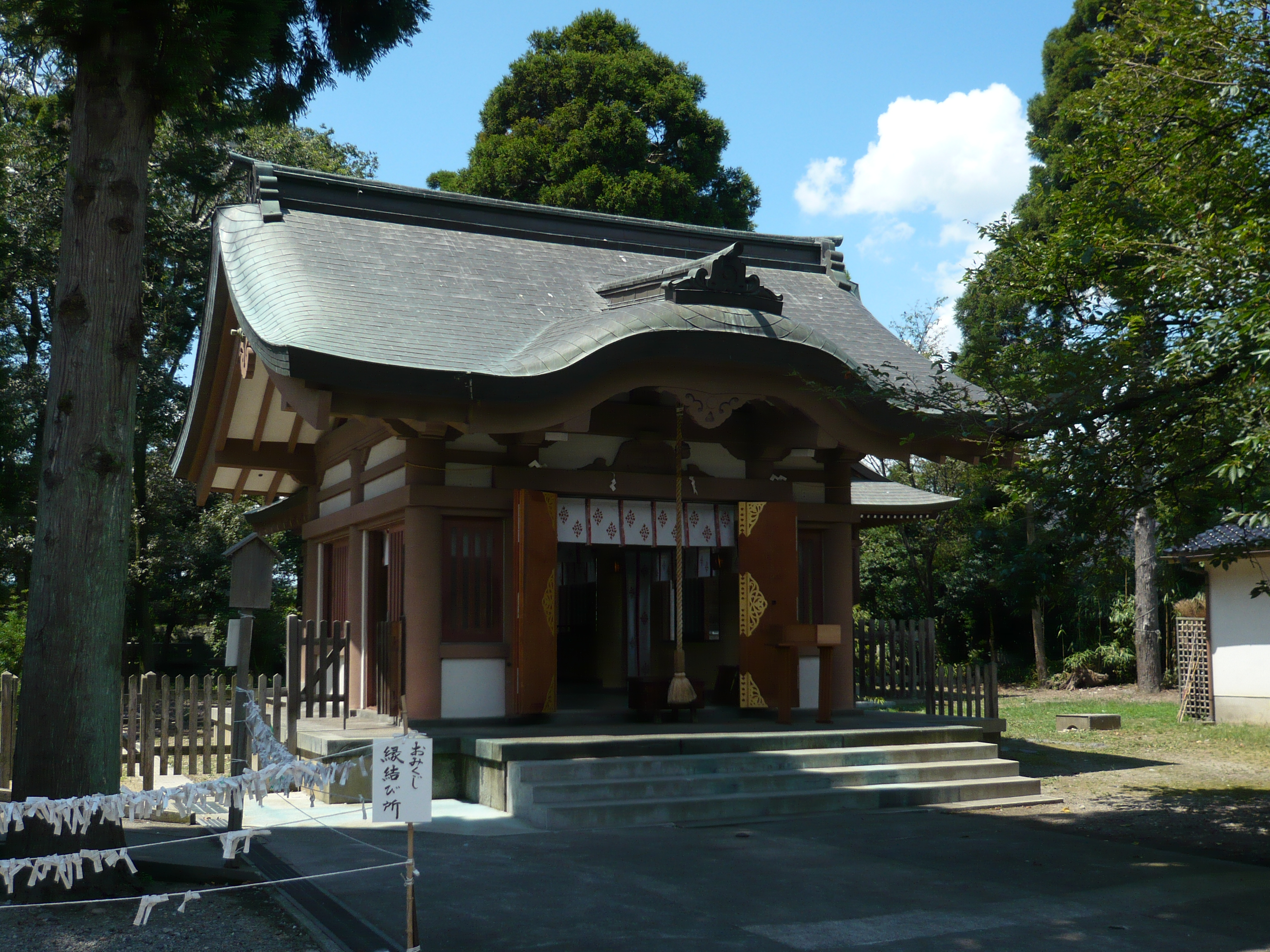 Toyamaken-gokoku-jinja, Toyama, Toyama, Japan 富山縣護國神社（富山県富山市）内 富山縣鎭靈神社